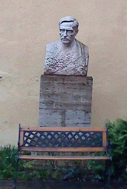 Szentgyörgyi István (Izsák Márton, 1953)[1] - Románia, Marosvásárhely (Târgu Mureş), Str Köteles Sámuel 6. a Színművészeti Egyetem Stúdió színházának bejárata mellett, balra. A kapu a terem zártakor szintén zárva van.Bust of István Szentgyörgyi